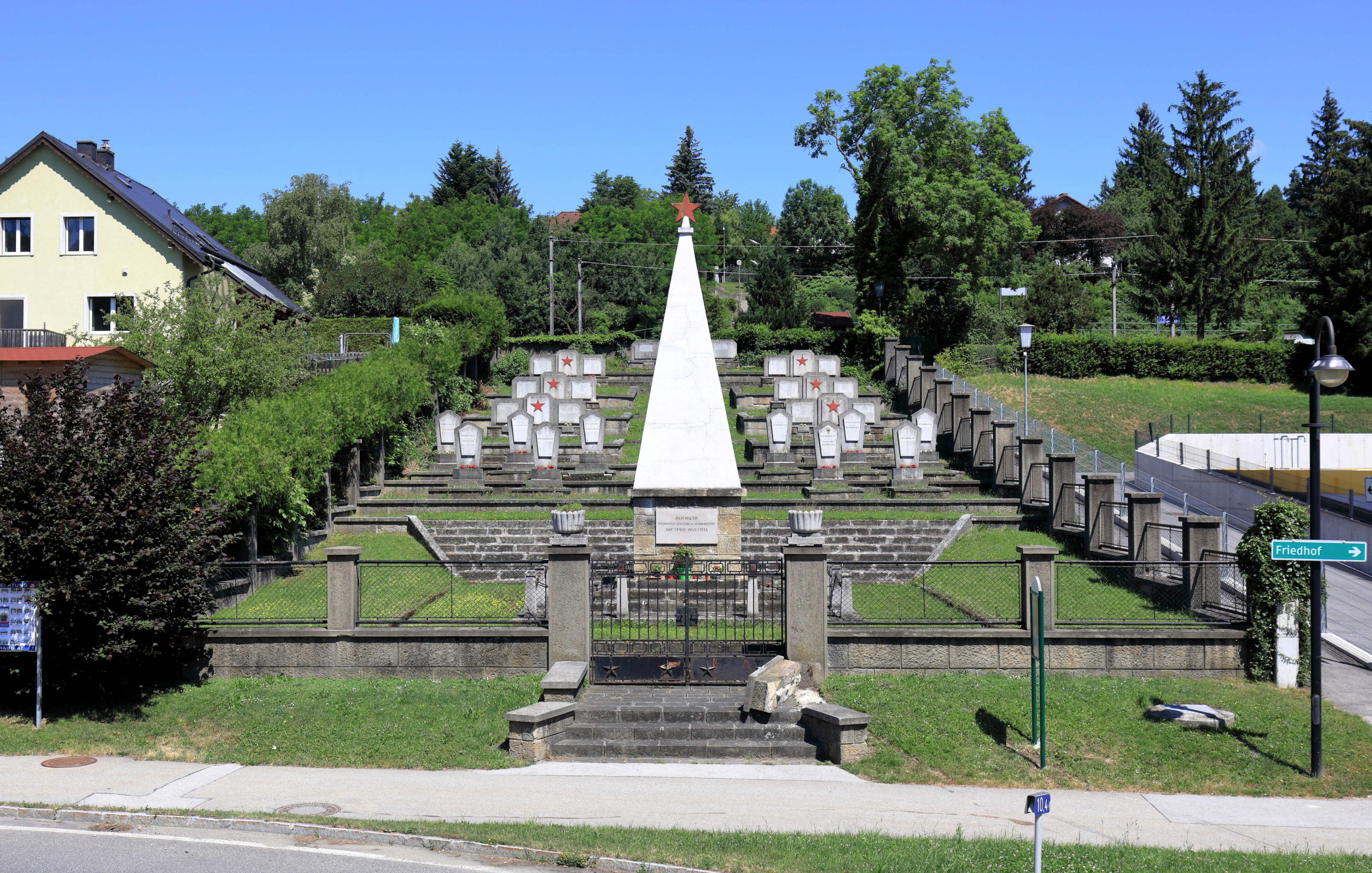 Der sowjetische Soldatenfriedhof in der niederösterreichischen Stadtgemeinde Pressbaum. Der Friedhof ist westlich des Ortsfriedhofes angelegt. In 11 Einzelgräbern und 7 Massengräbern sind rund 280 bis 300 sowjetische Soldaten bestattet. Die Inschrift am Sockel des Obelisken in russischer Sprache lautet: "Gefallen während des Krieges für die Befreiung Österreichs 1945".